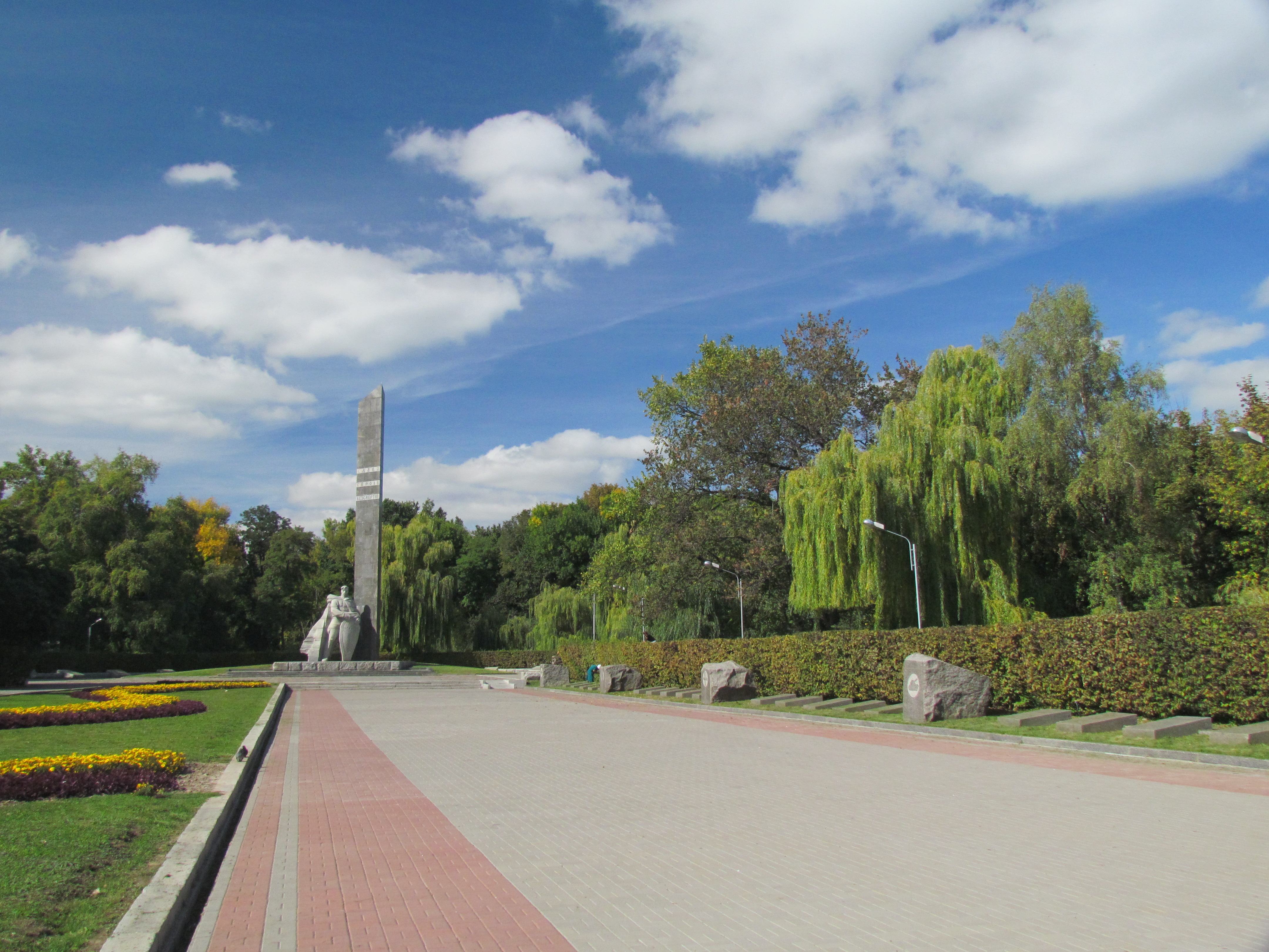 Меморіальний комплекс Солдатської Слави – братська могила 3,5 тис. жертв фашизму